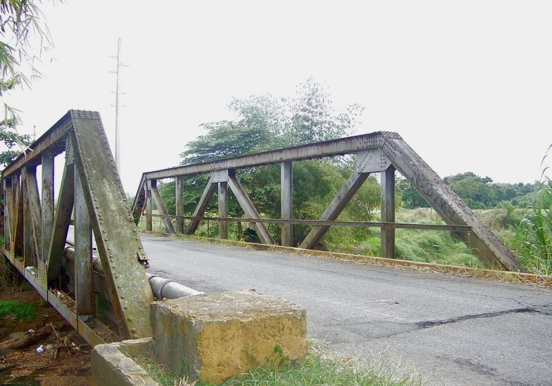 Pasa sobre el Río Culebrinas. Fue terminado en el año 1928 y tiene una longitud de 25.9 metros. Este tiene un armazón lateral de "Ws" con postes en acero; tablero de hormigón reforzado en el lado ferroviario. Está localizado en el kilómetro 0.5 de la carretera Núm. 418 del Sector Coloso de Aguada. Es único en cuanto a su tablero, el cual tuvo una doble función de carretera y ferrovía. La parte oeste del pavimento oculta las vías del ferrocarril privado que tuvo la Central Coloso. Información sobre Aguada en